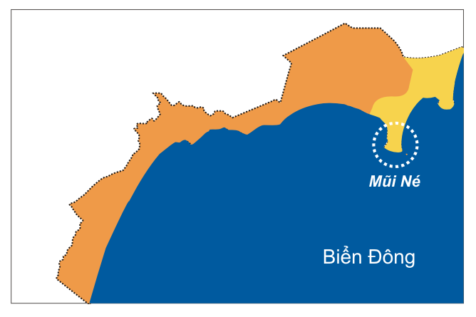 Lược đồ cho thấy vị trí Mũi Né